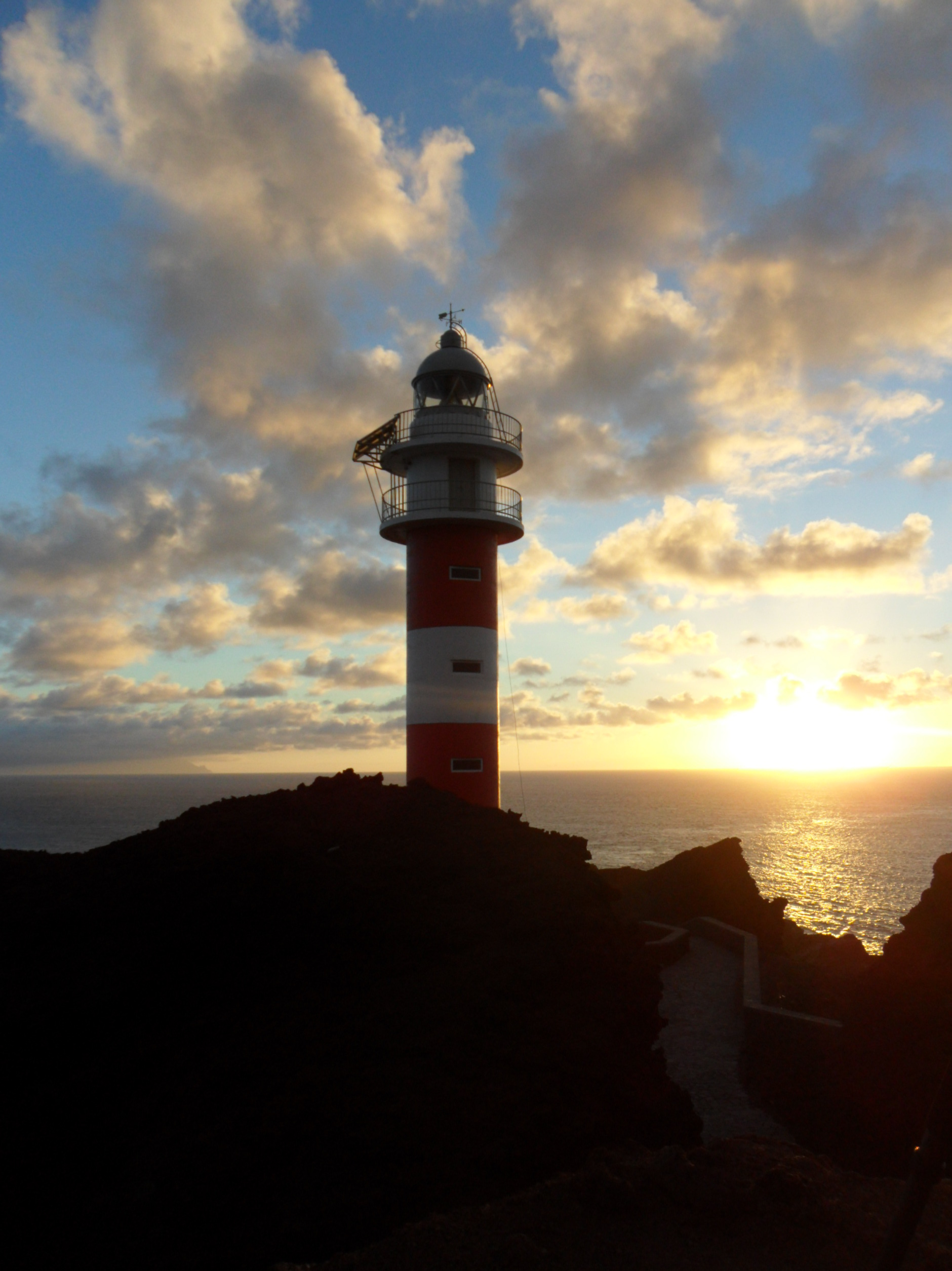 Faro de la Punta del Teno This is a photography of a Special Area of Conservation in Spain with the ID: ES7020096. Natura2000 entry, EEA entry